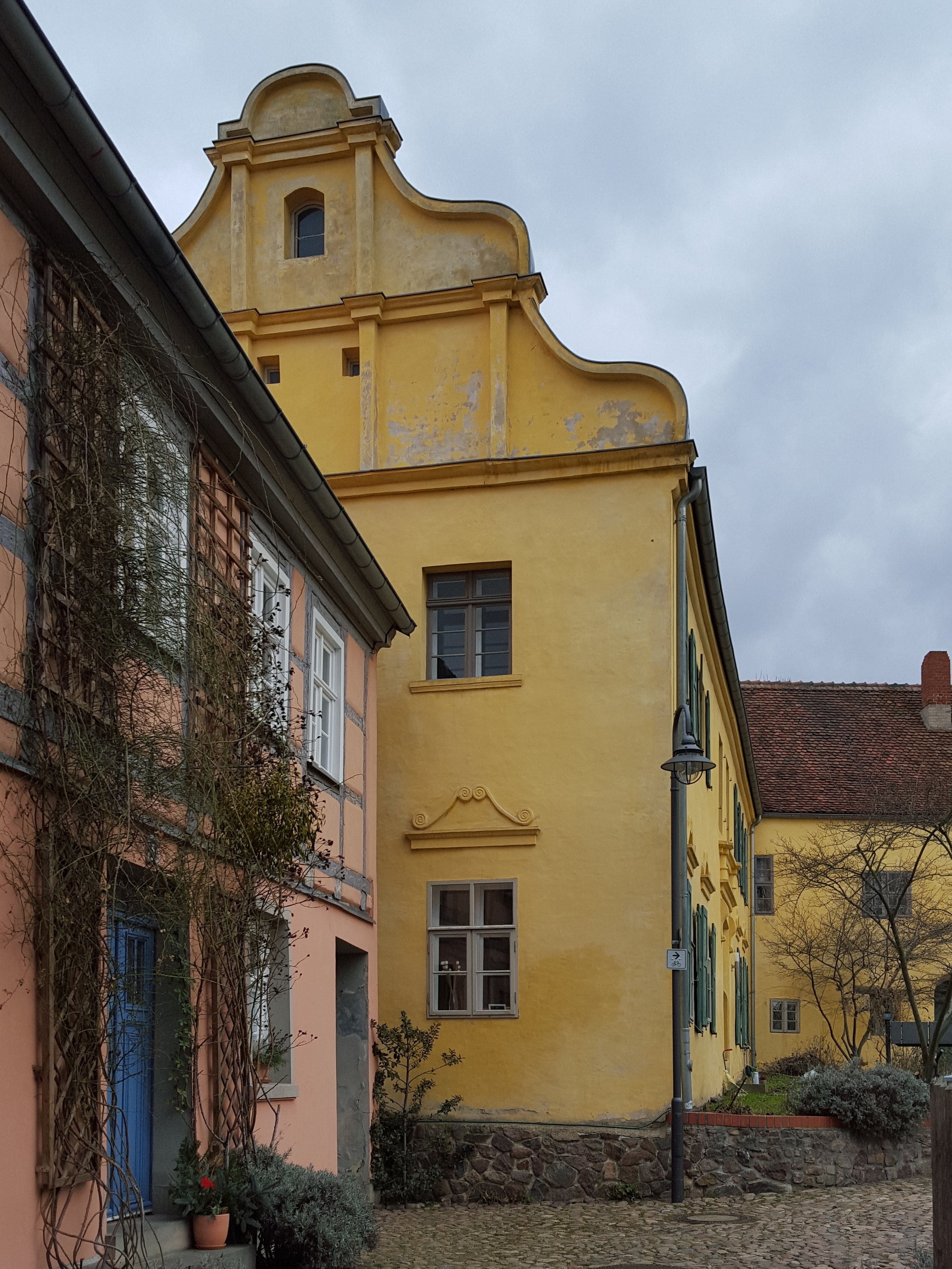 klosterebäude ziesar renaissancegiebel